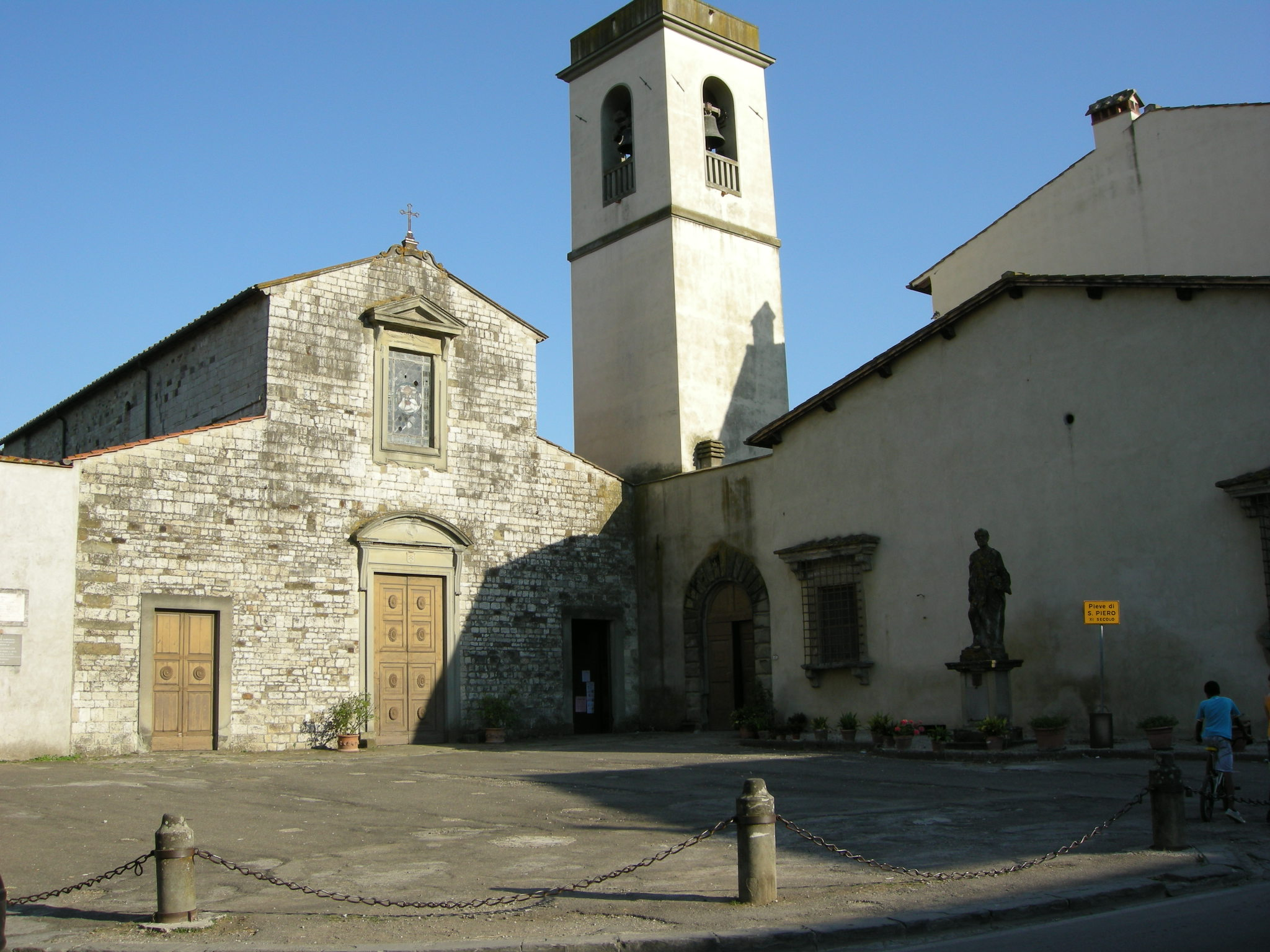 Pieve di San Pietro (San Piero a Sieve)